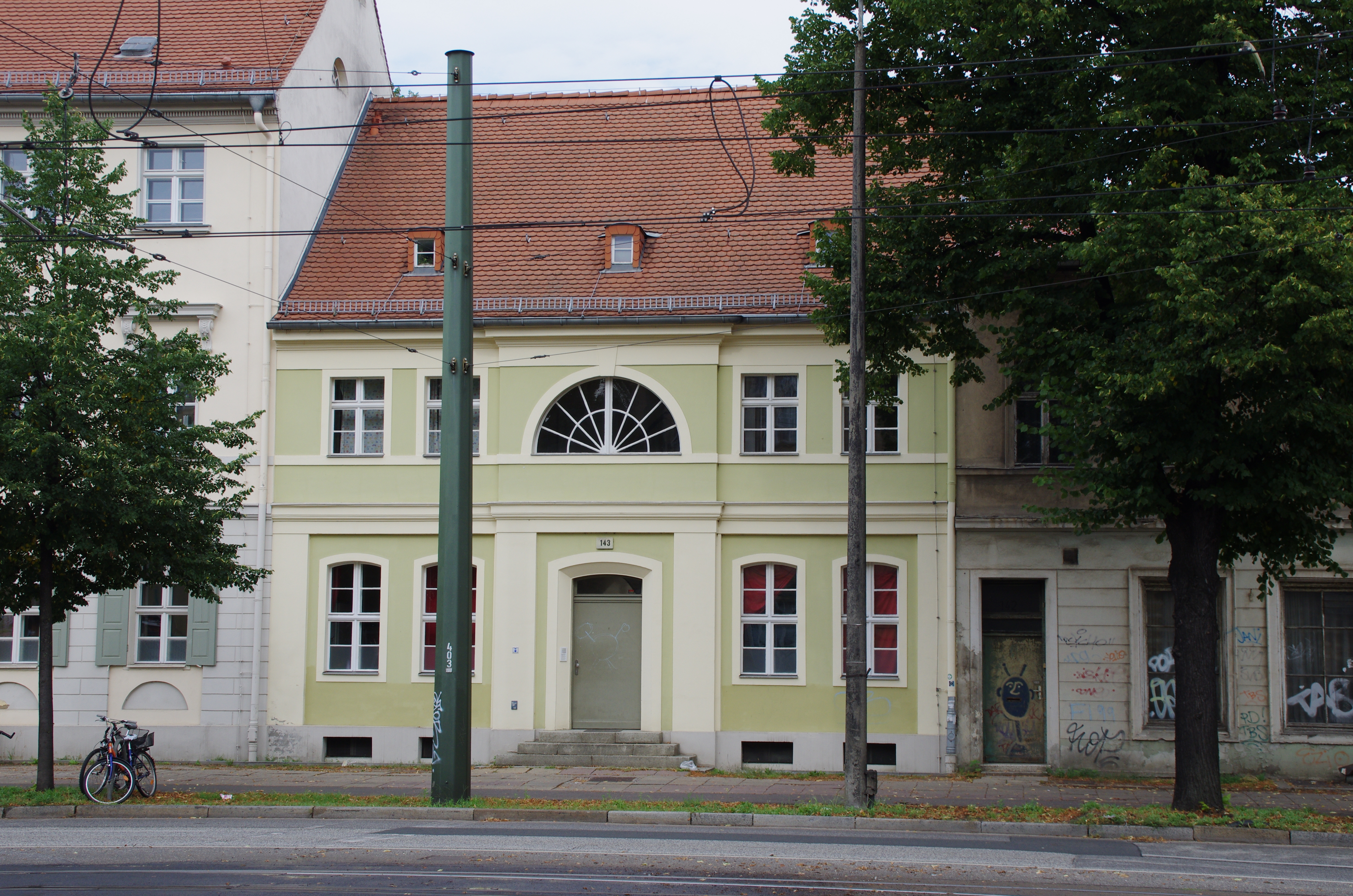 Potsdam in Brandenburg. Das Haus in der Straße Berliner Straße 143 steht unter Denkmalschutz.